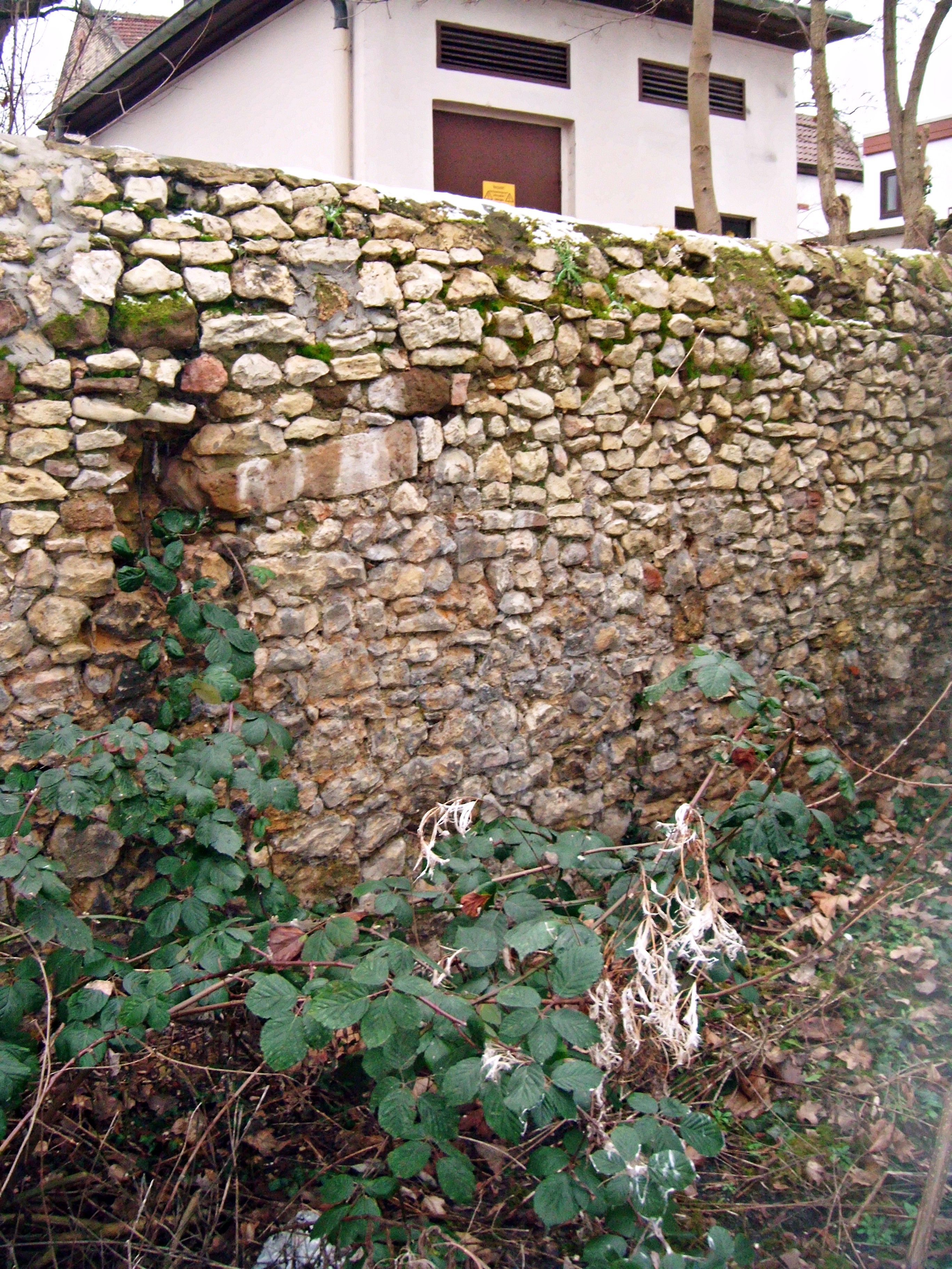 Grünstadt, Peterspark, mittelalterliche Wehrmauer (abgerissen nach 2015)